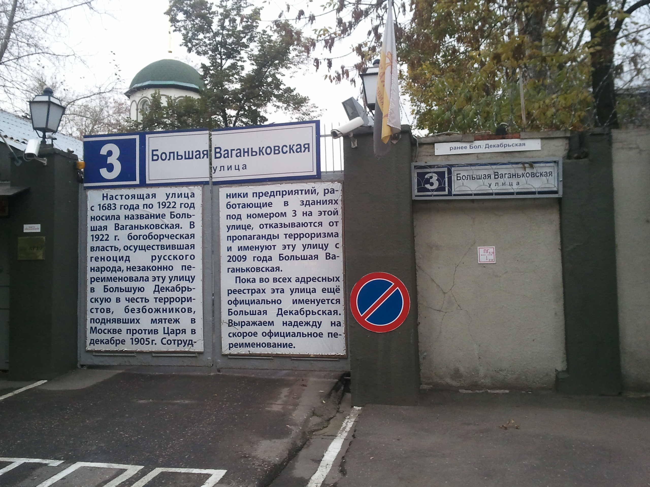 Указатель на доме №3 по ул. Большая Декабрьская (Москва, Россия).